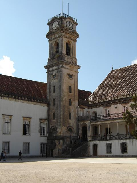 Bild:Torre coimbra.jpg